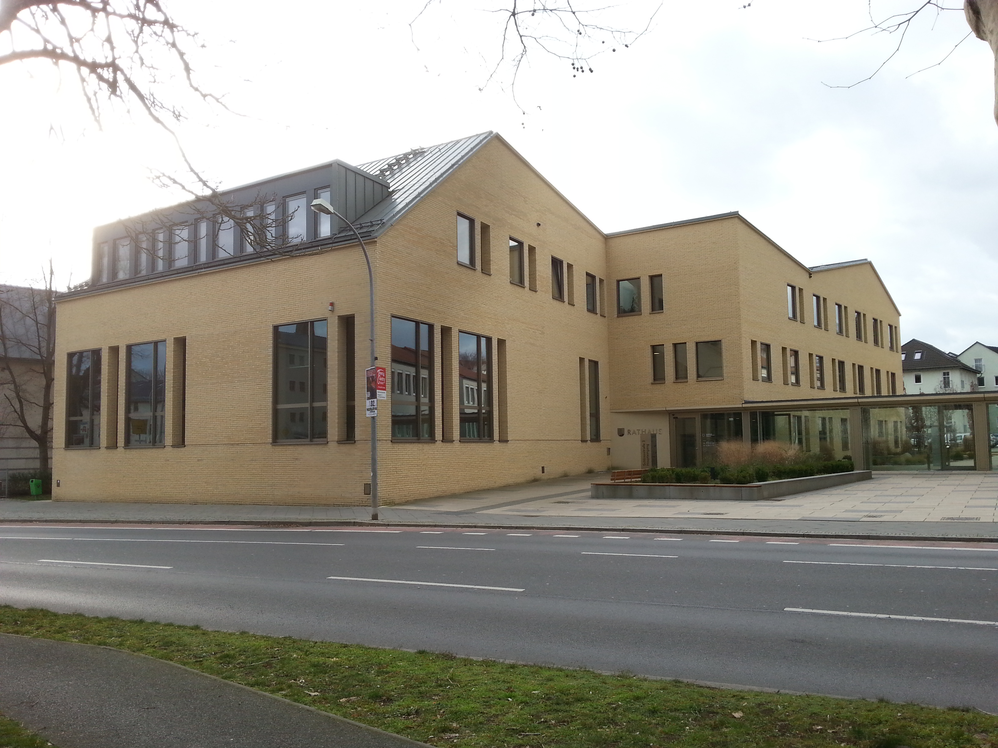 Neues Rathaus von Königs Wusterhausen in der Schlossstrasse 3, gegenüber dem Schloss.